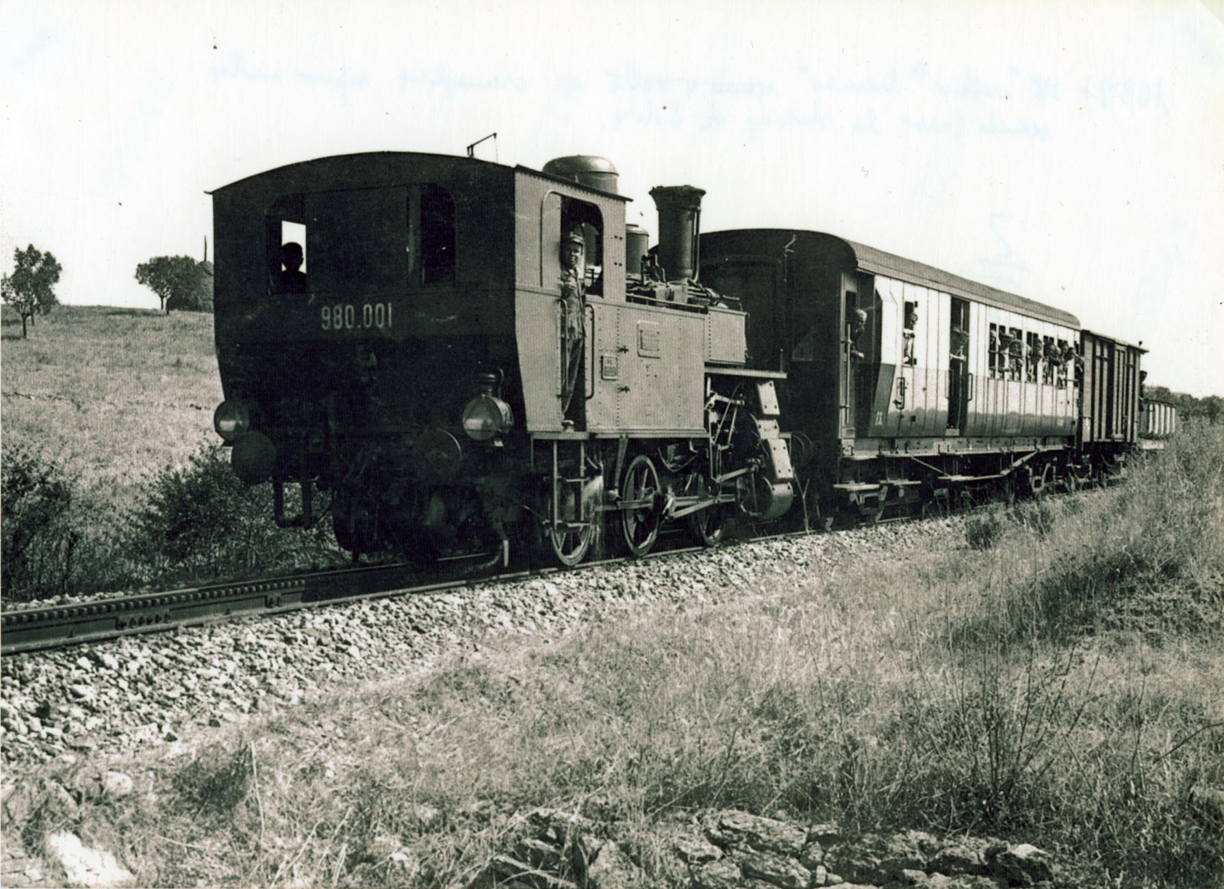 Convoglio in transito sulla ferrovia Saline-Volterra